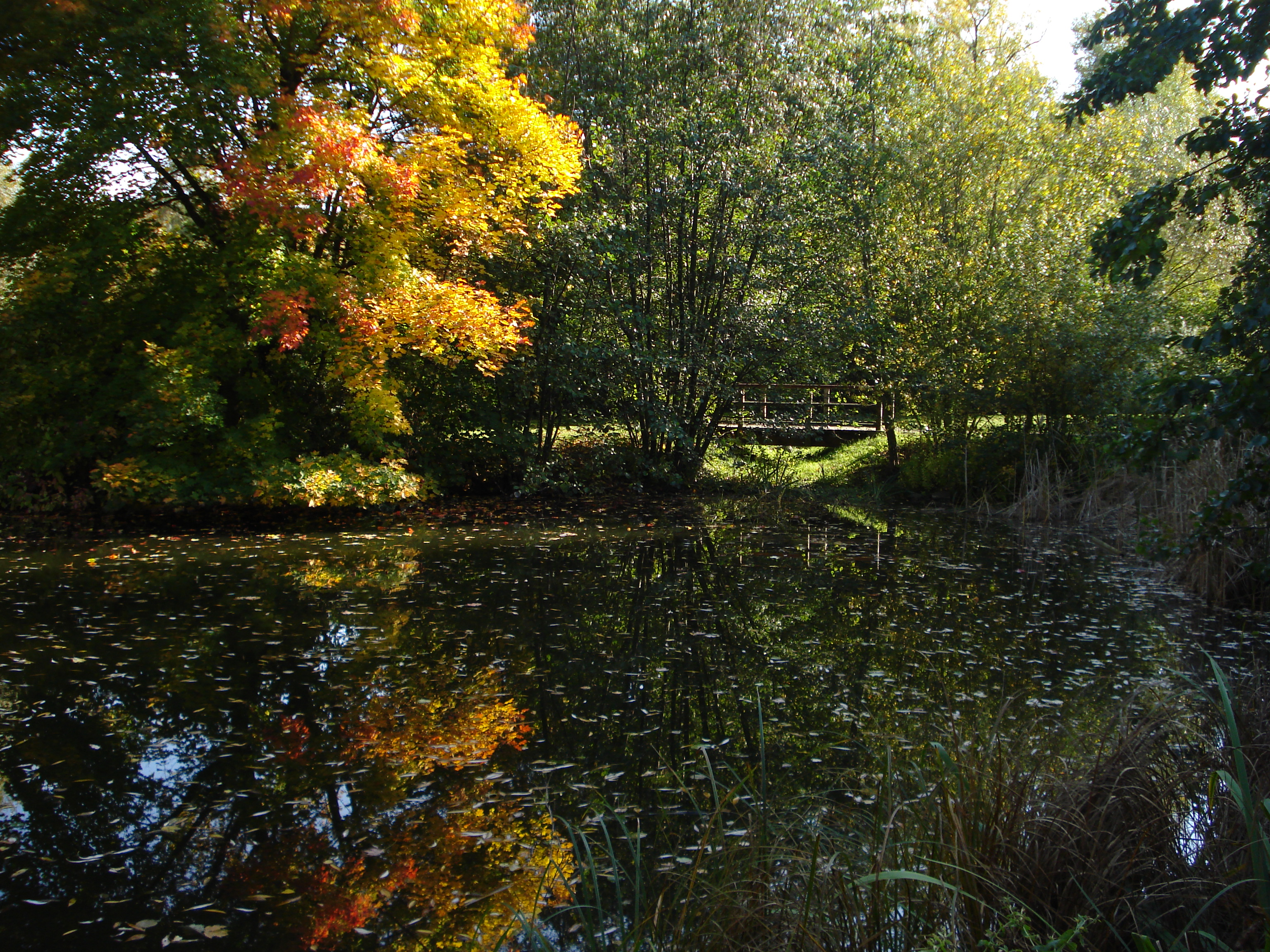 Der Ententeich unterhalb der Westbachquelle in Herne, Oktober 2013. Der Zulauf des Bachs ist in der Bildmitte unterhalb der Fußgängerbrücke erkennbar.